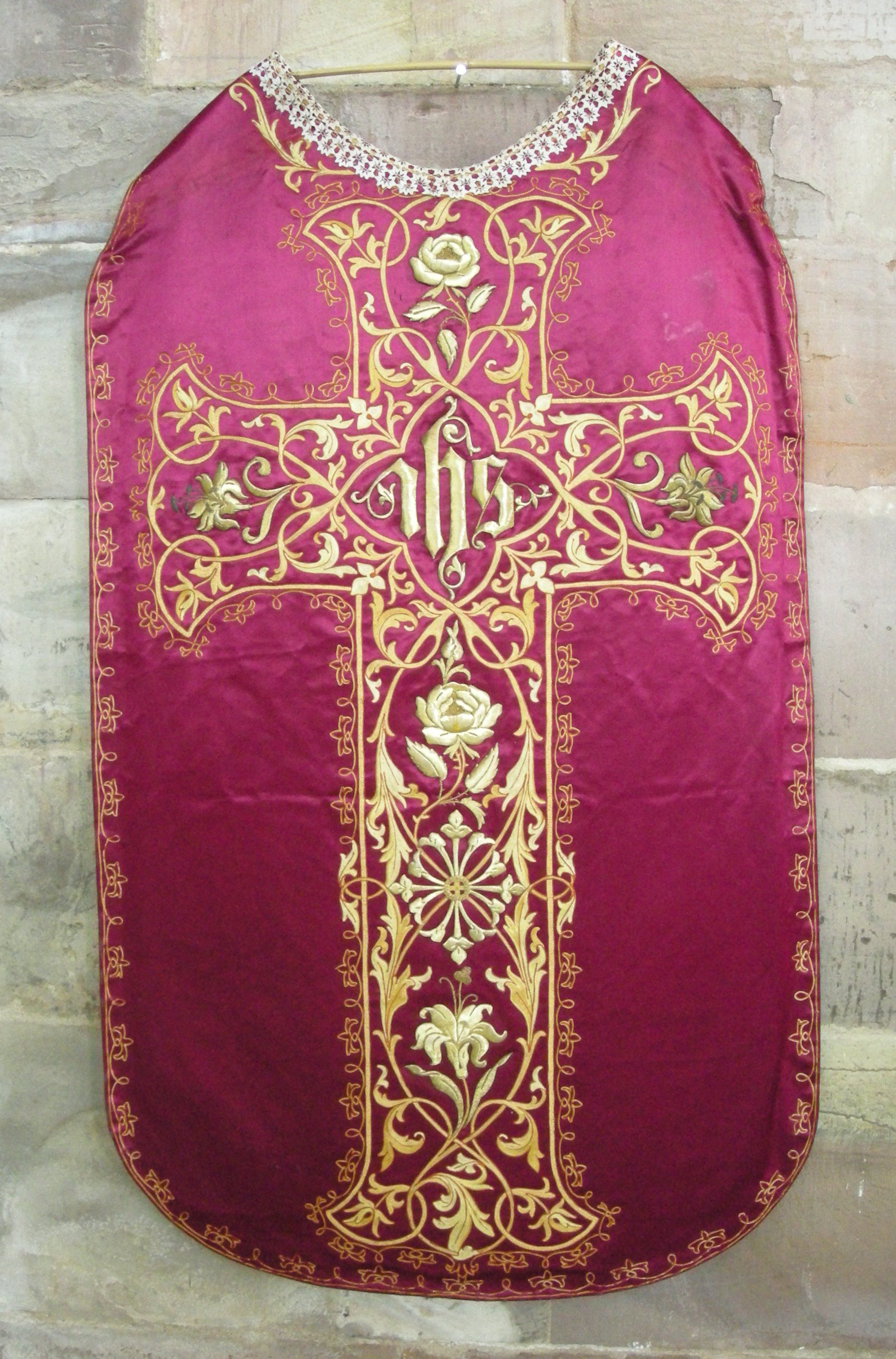 Chasuble pour la Pentecôte et les Martyrs, présentée dans le cadre d'une exposition temporaire à l'abbaye Notre-Dame d'Autrey (Vosges) en 2008.